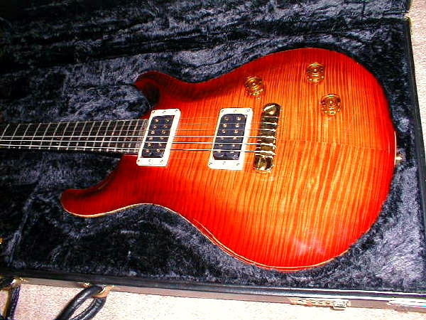 Picture of Mrjazzguitar's guitar..enjoy